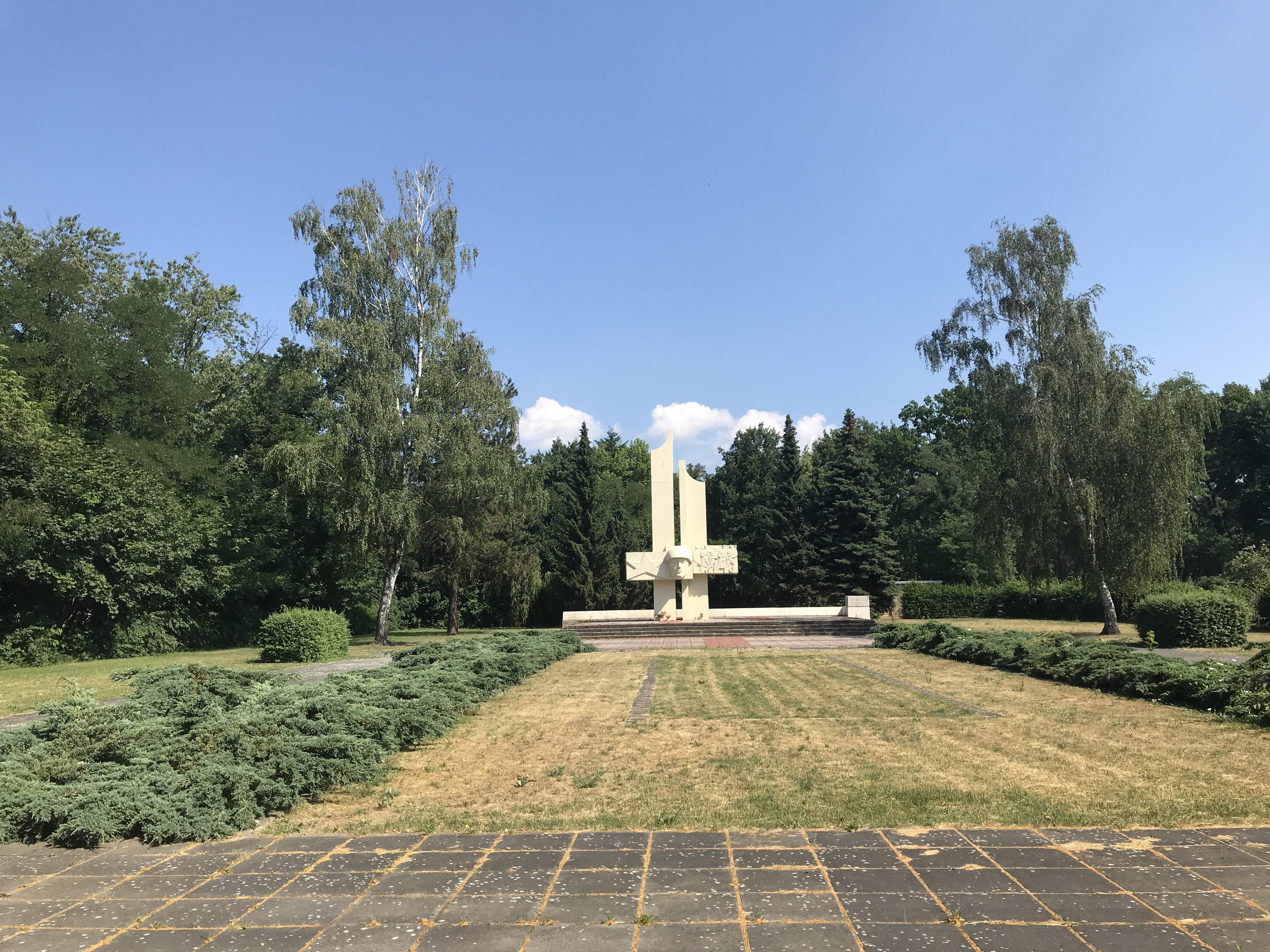 Monument von Burschik auf den Sowjetischen Ehrenfriedhof in Lübben (Spreewald) im Land Brandenburg